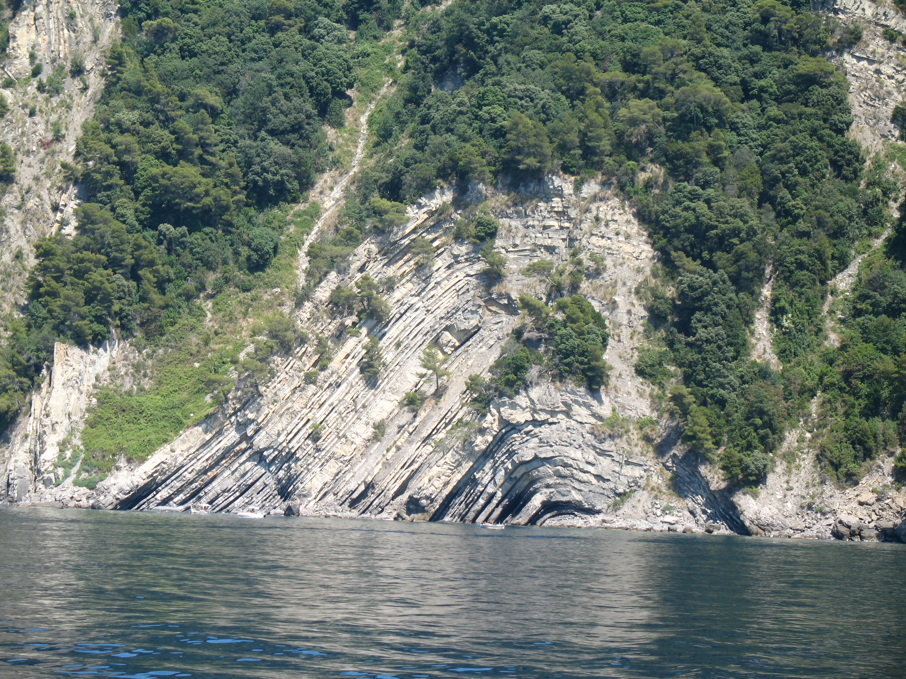 Camogli